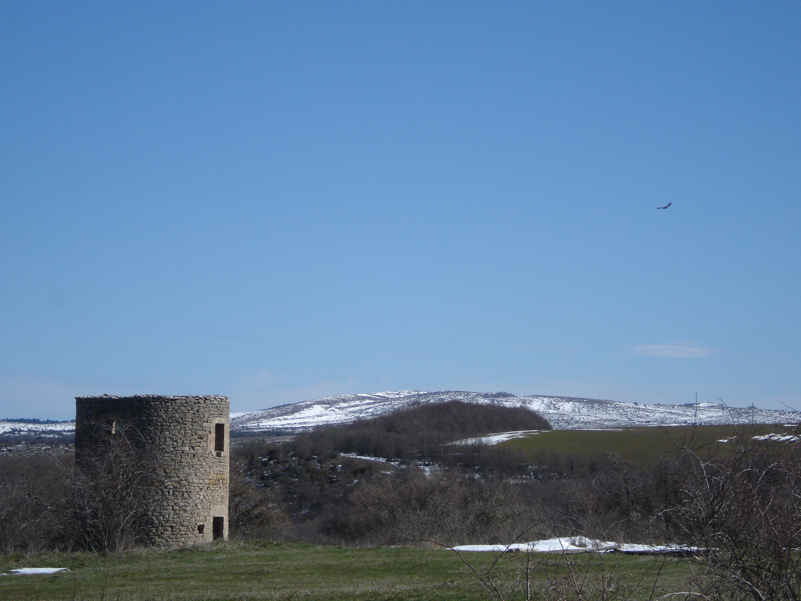 Buitre sobrevolando las ruinas del antiguo molino harinero. Febrero de 2012